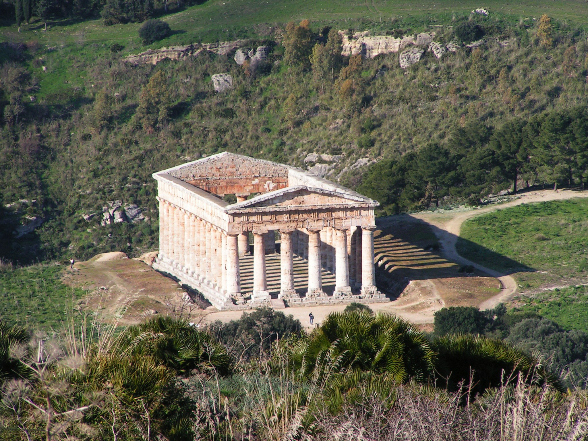 Segesta Tempio